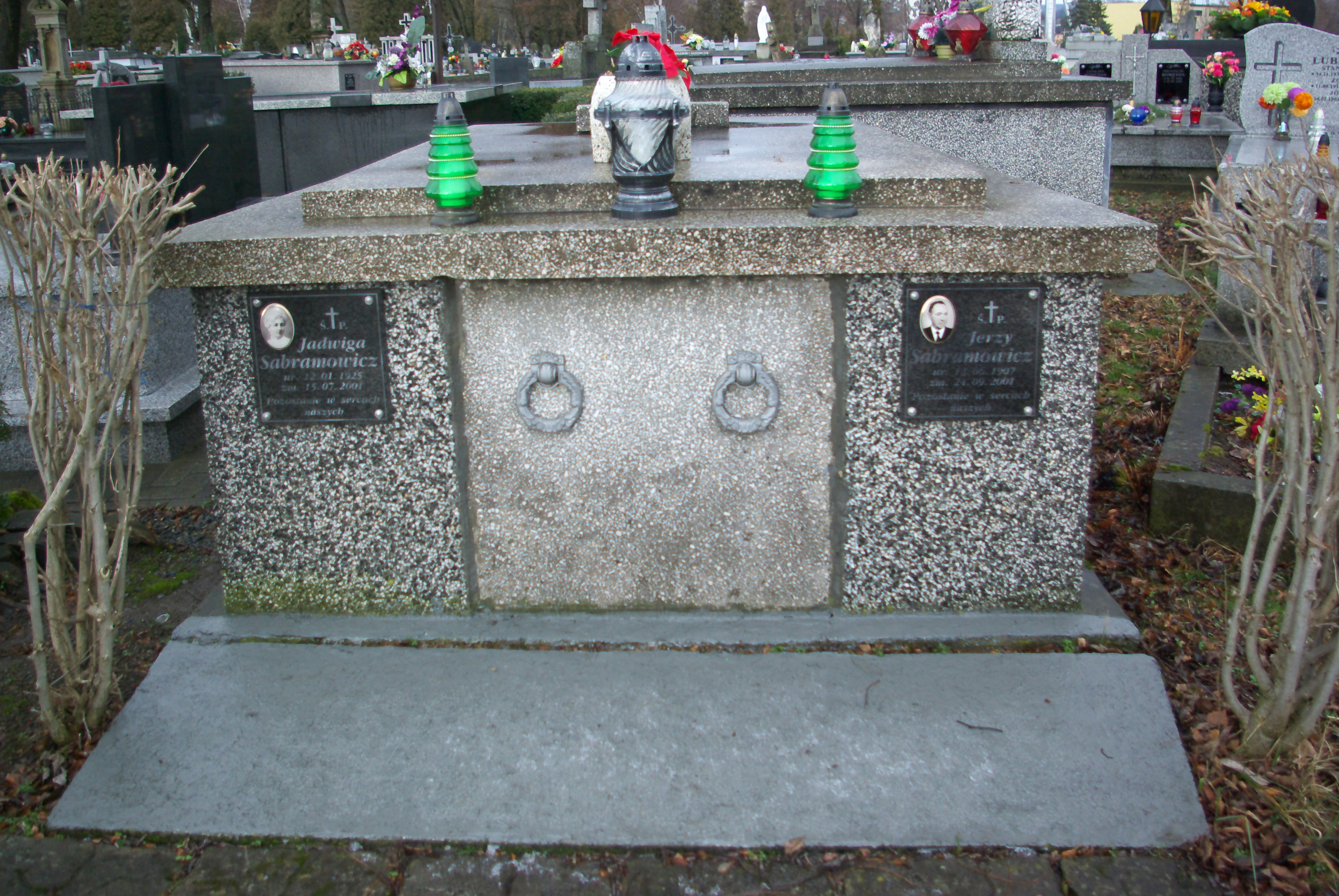 Grobowiec Janiny i Jerzego Sabramowicz w części „Matejki Stary” Cmentarza Centralnego w Sanoku.